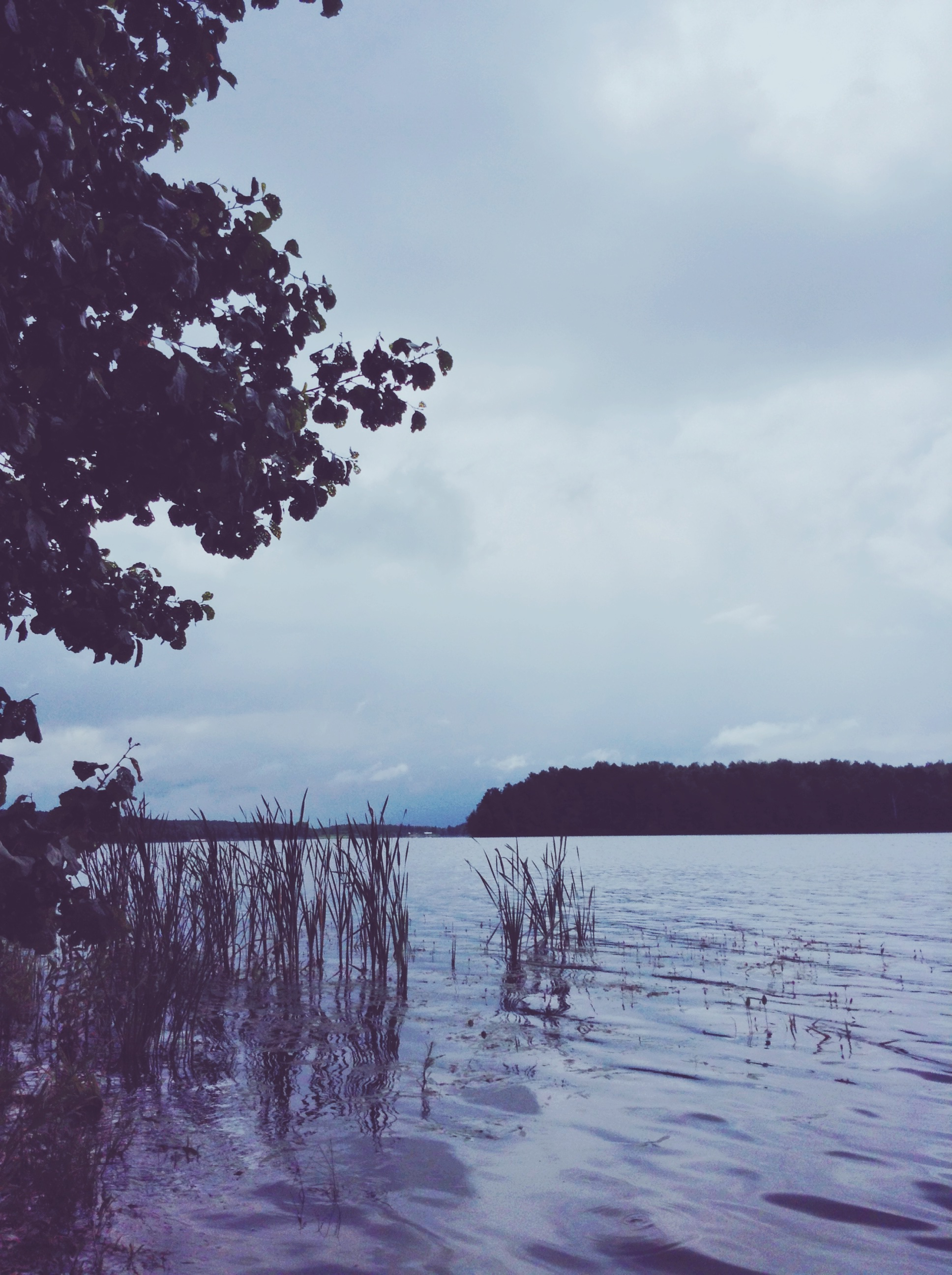 Еловое озеро, Чебаркульский район This image is related to the protected area of Russia number 7410303